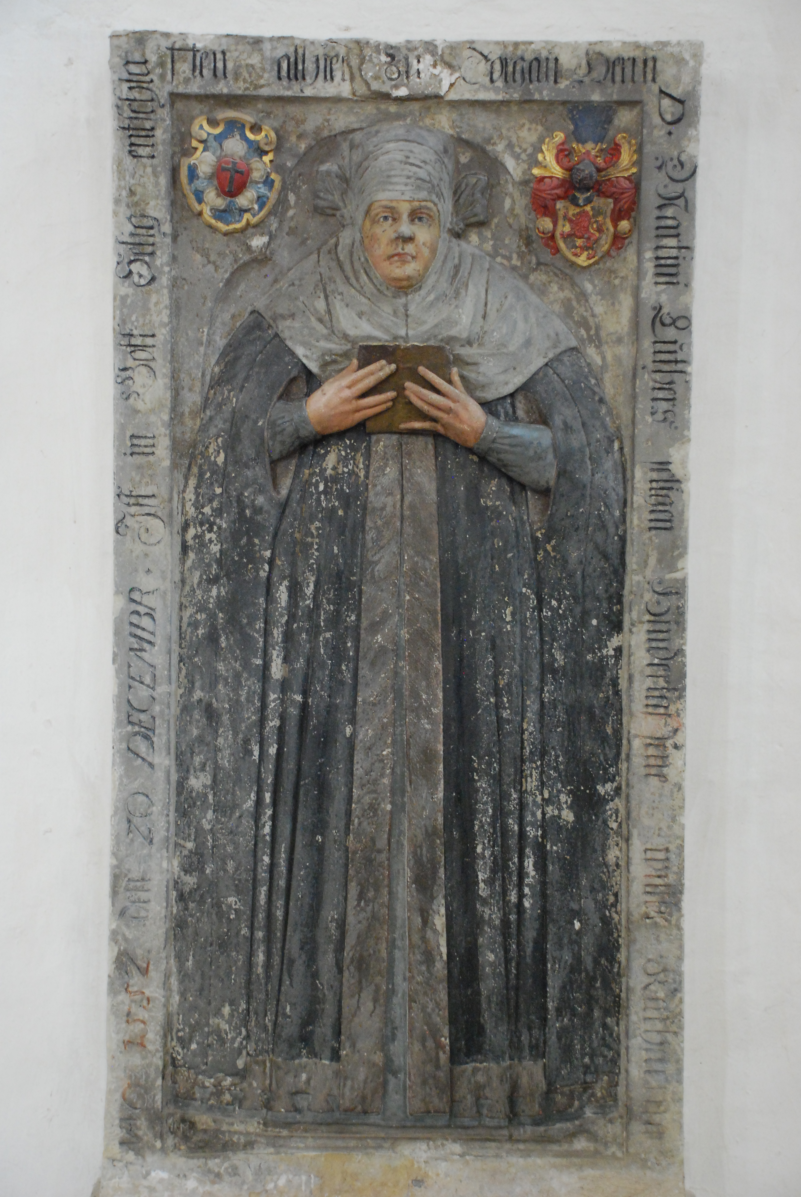 Katharina von Boras ligsten.